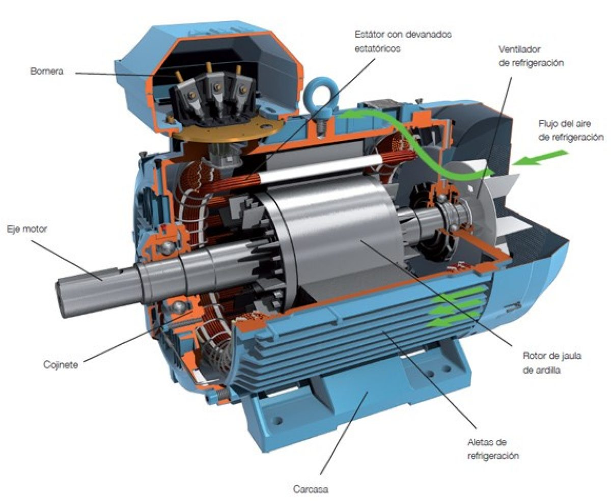 Makina asinkrono orokorra